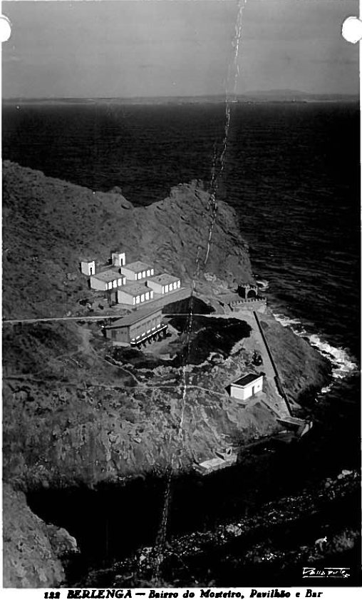 O bairro dos pescadores na Berlenga, antes da existência da reserva natural.